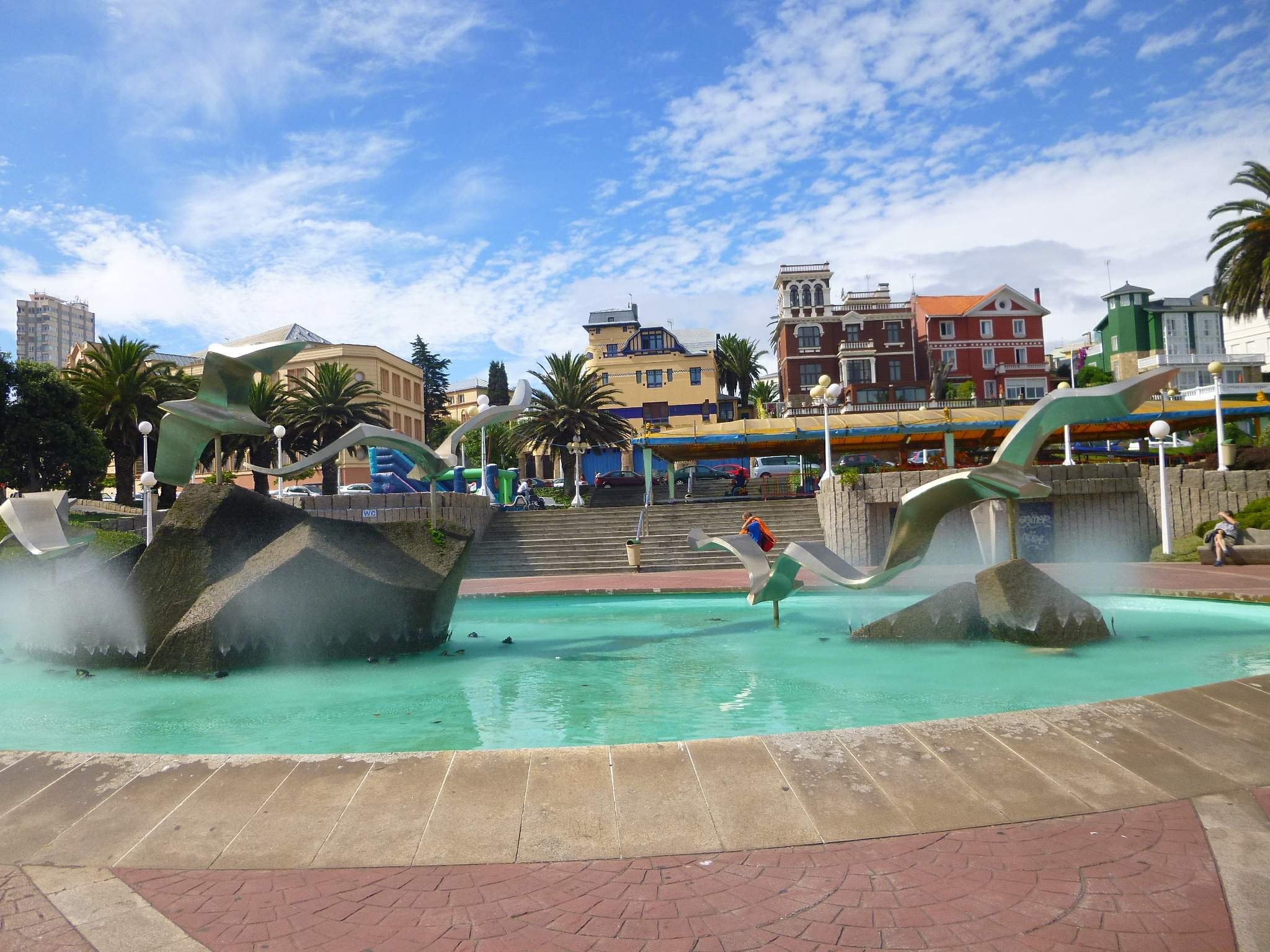 A Coruña - Plaza de Portugal